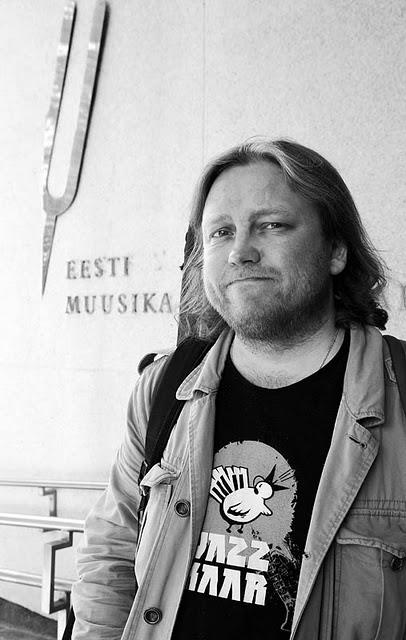 Sakarias Jaan Leppik